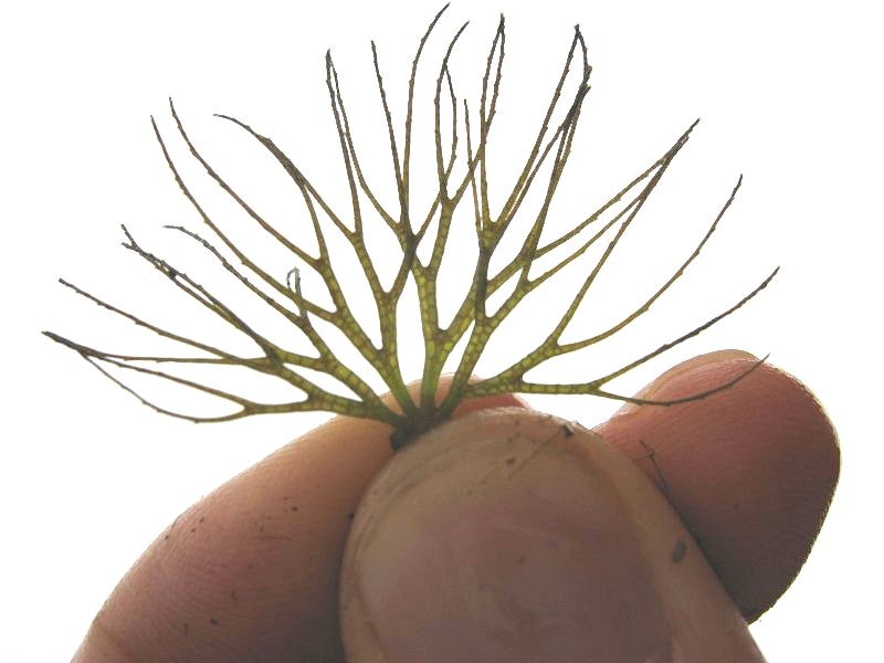 Blatt eines Zarten Horblattes Ceratophyllum submersum (Winterform)